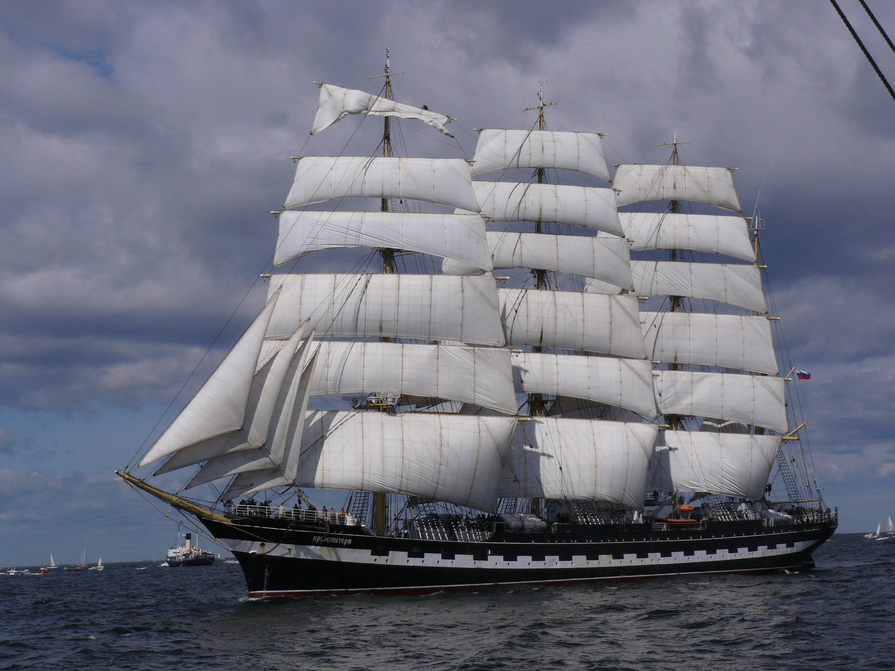 Крузенштерн